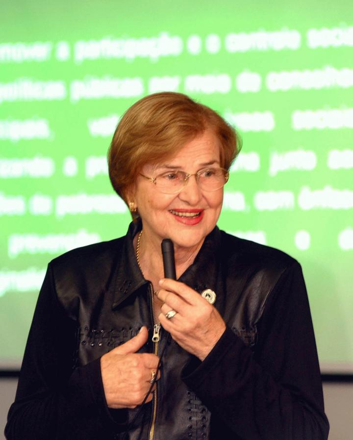 40338 Brasília - A coordenadora da Pastoral da Criança, Zilda Arns, fala na Comissão de Seguridade Social e Família, da Câmara dos Deputados. (foto:Wilson Dias)